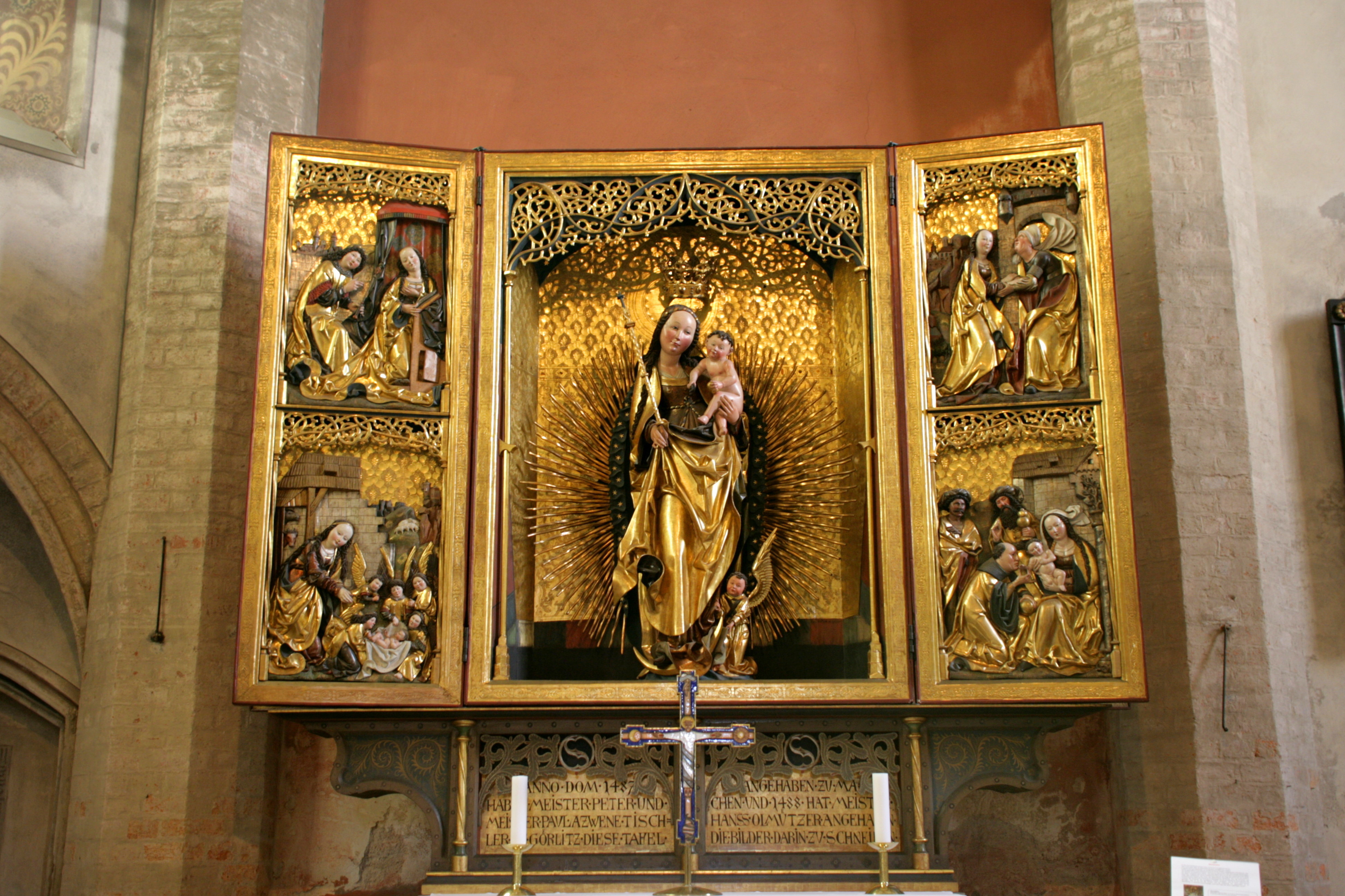 Dreifaltigkeitskirche, Obermarkt in Görlitz